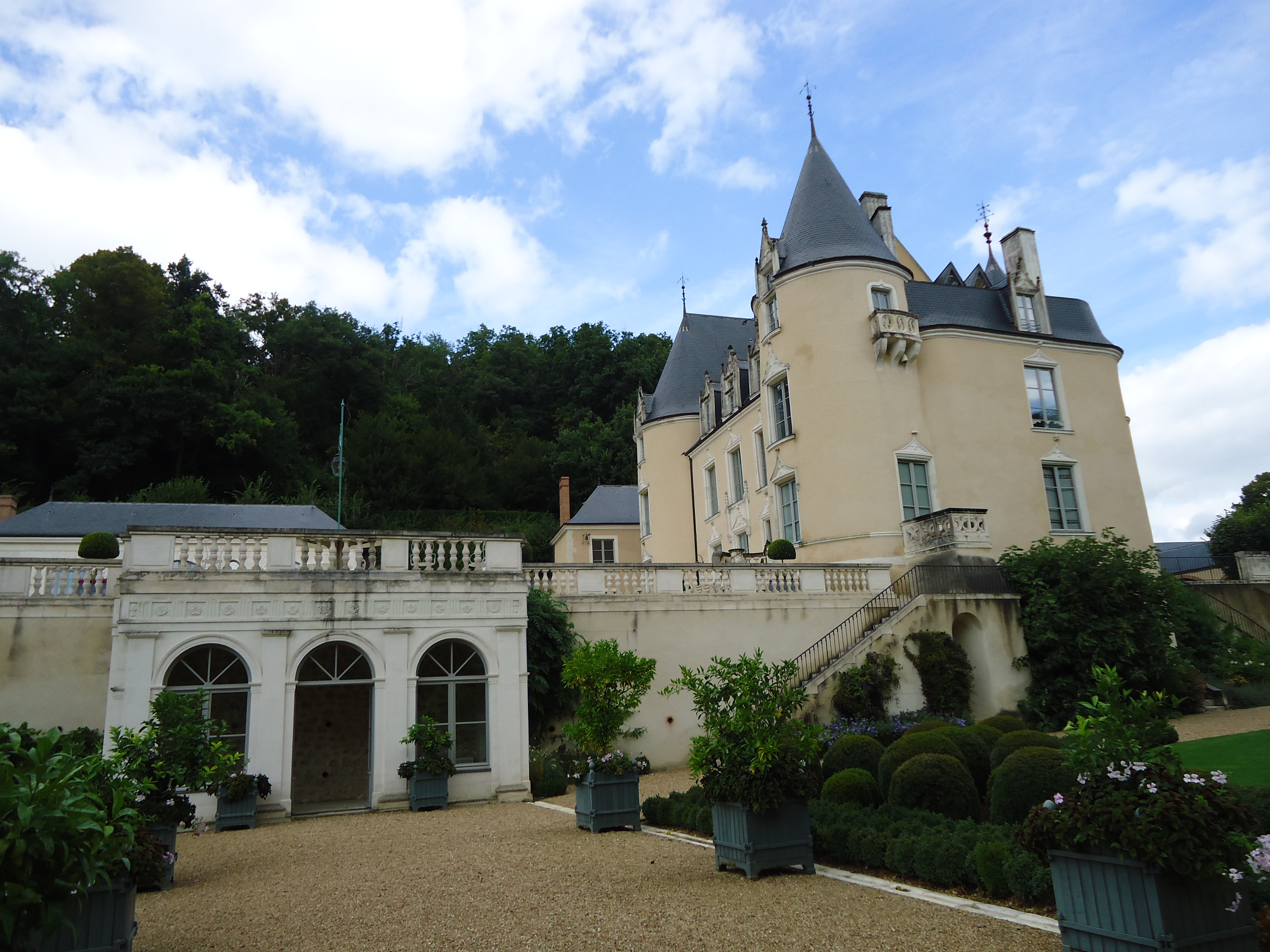 Château de la Motte-Thibergeau - Flée - Sarthe (72)